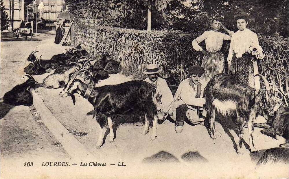 Traite de chèvres des Pyrénées à Lourdes, Hautes-Pyrénées (vers 1870-1890). Reproduction d'une carte postale de cette époque.